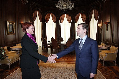 Министр сельского хозяйства Елена Борисовна Скрынник во время встречи с Дмитрием Анатольевичем Медведевым, 12 марта 2009 года